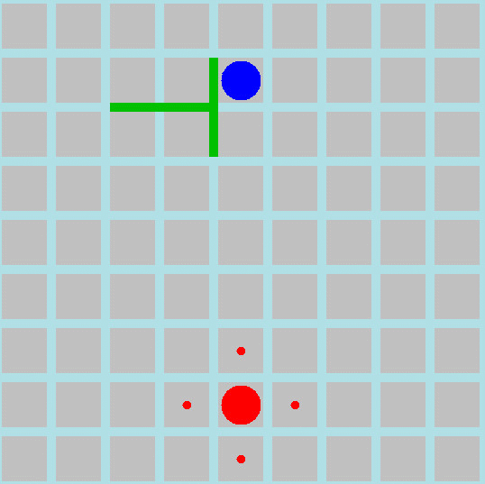 The response of the sidewall